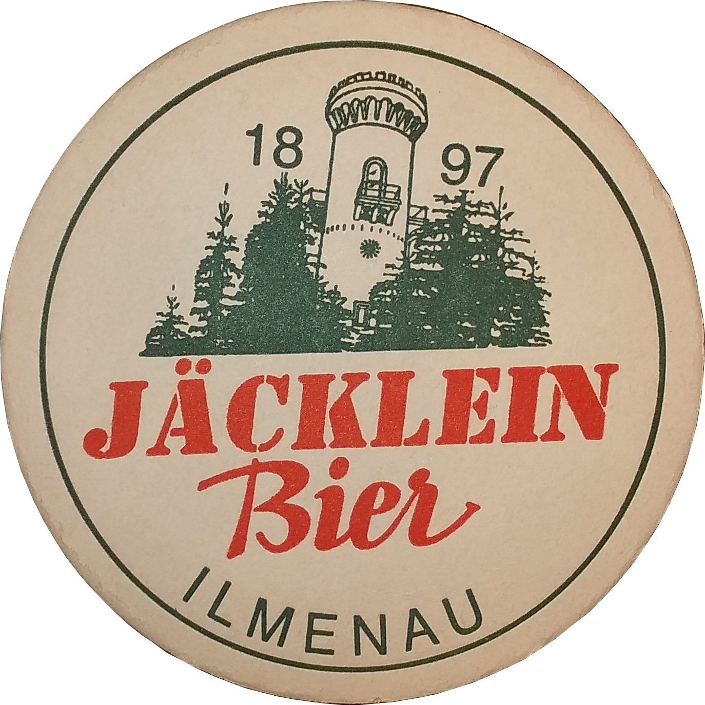 Bierdeckel mit Werbeaufdruck für die Ilmenauer Brauerei Gebrüder Jäcklein.